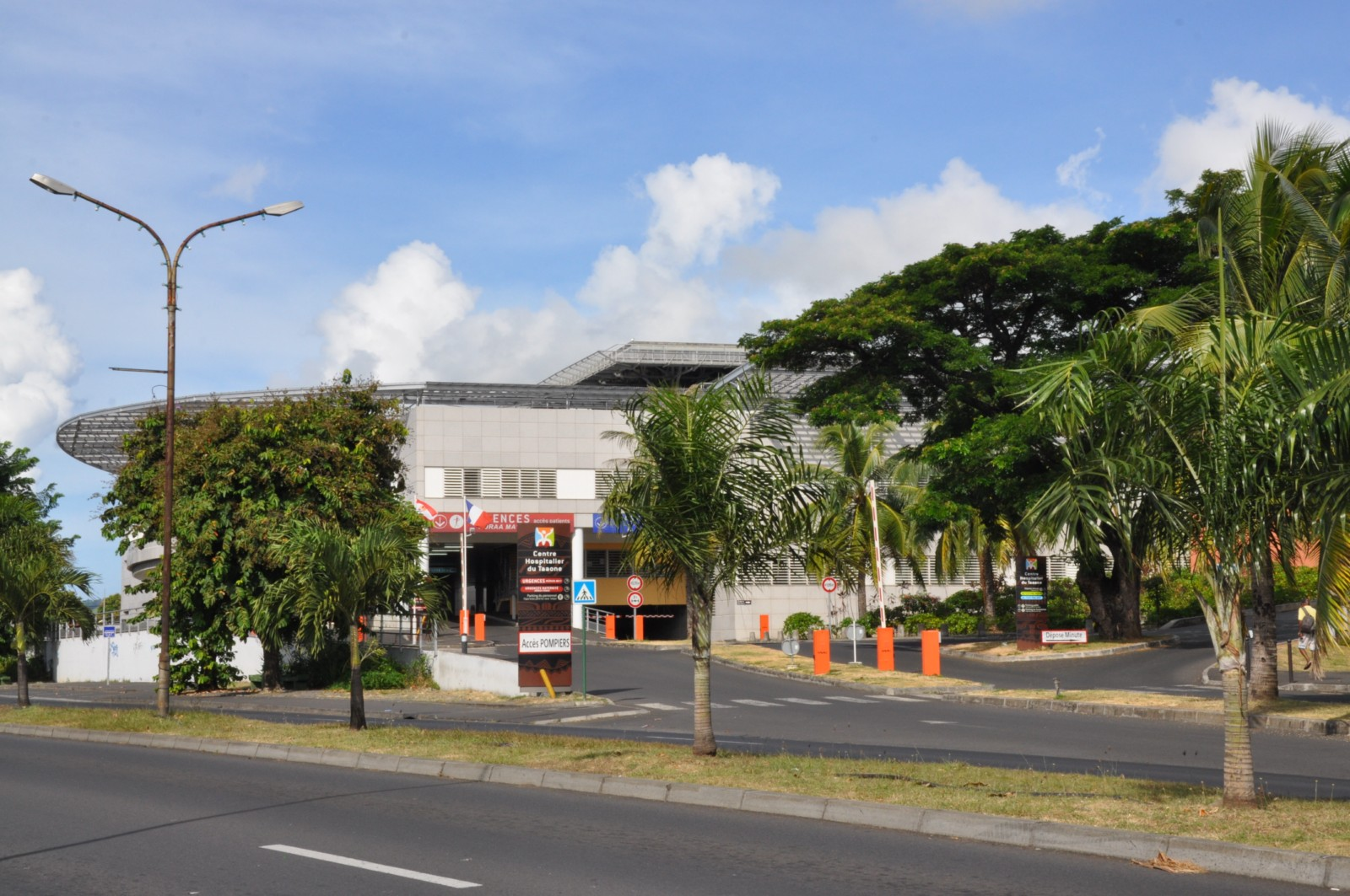 Centre hospitalier du Taaone